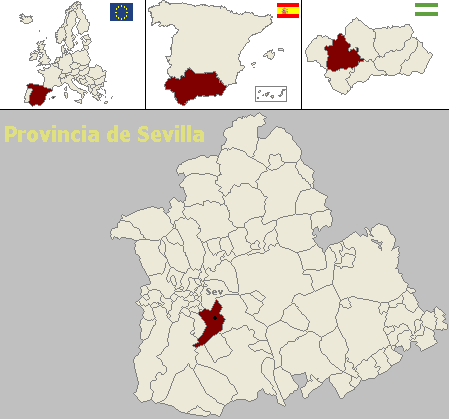 Ubicación del municipio de Dos Hermanas (Sevilla, España)